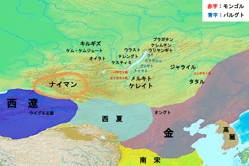 13世紀における北方遊牧諸民族。